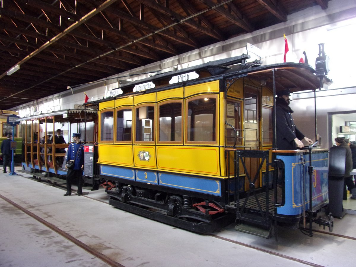 Elektrischer Triebwagen Nr. 3 von 1896 der Nürnberg-Fürther Straßenbahn im Historischen Straßenbahndepot St. Peter